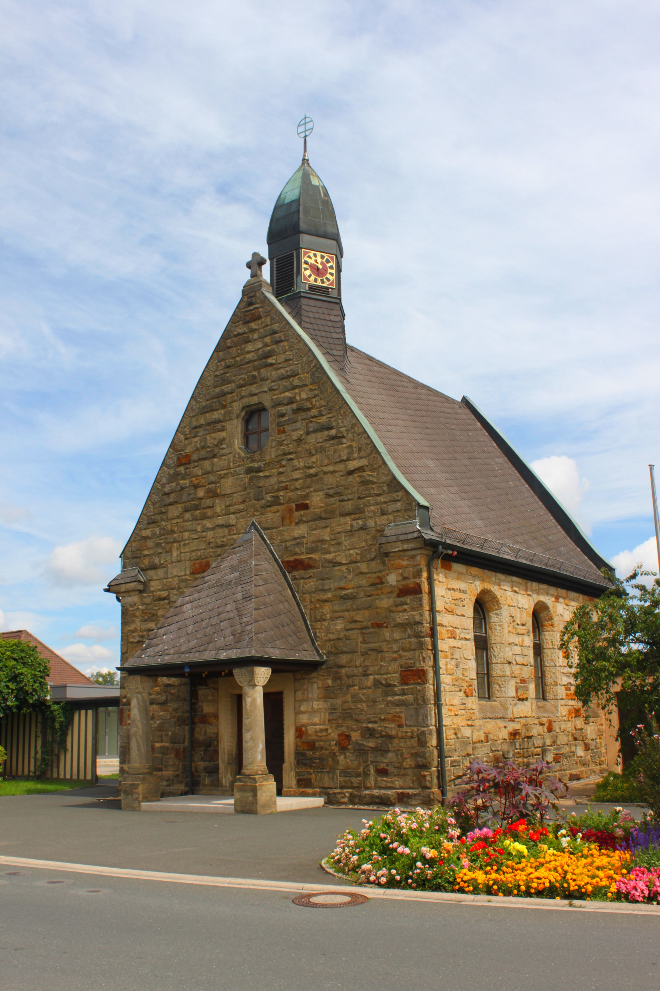 Die katholische Kapelle Zum Herzen Mariä, Schwürbitzer Straße 1, Neuensee, Michelau in Oberfranken